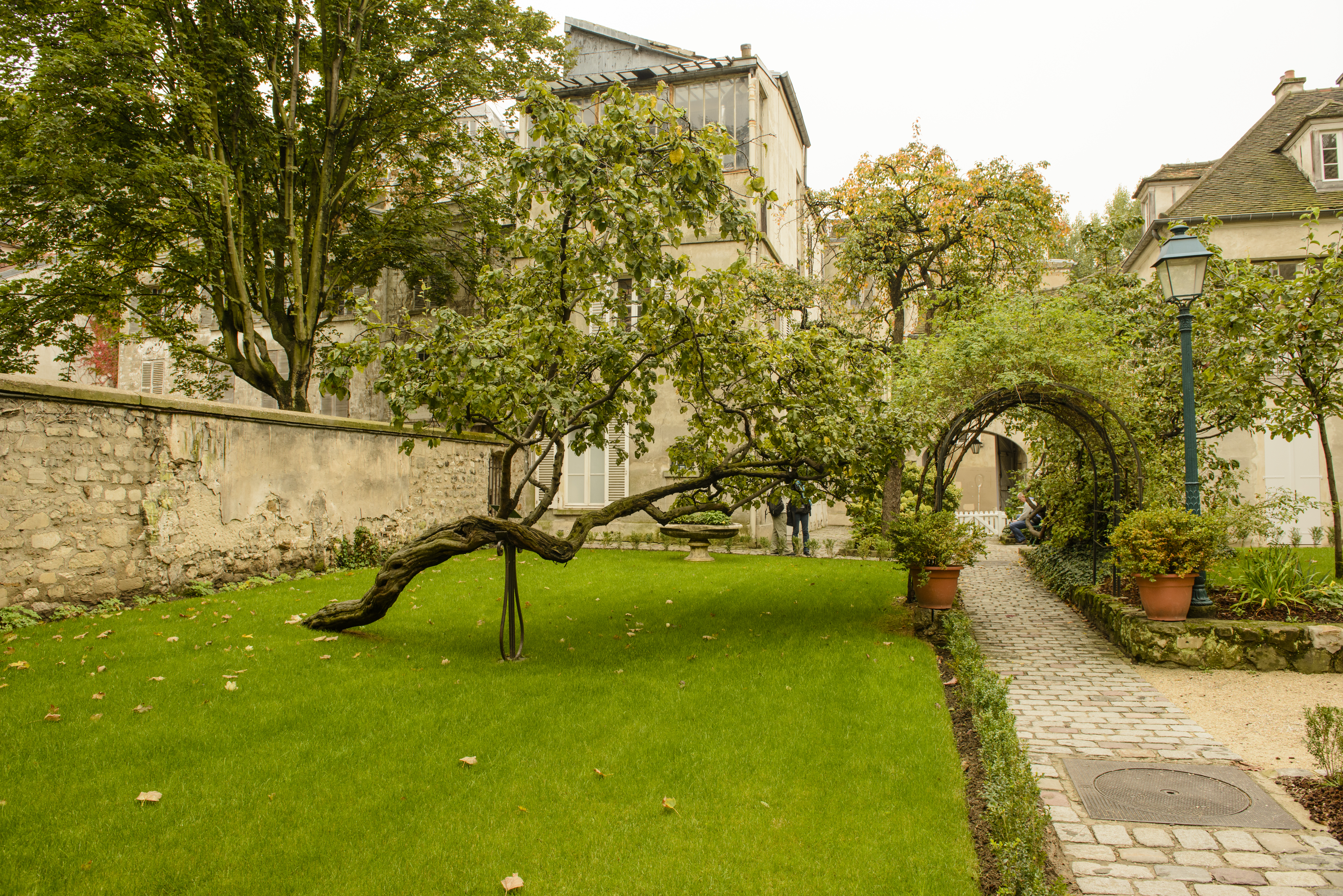 Montmarte Museum Garden 1